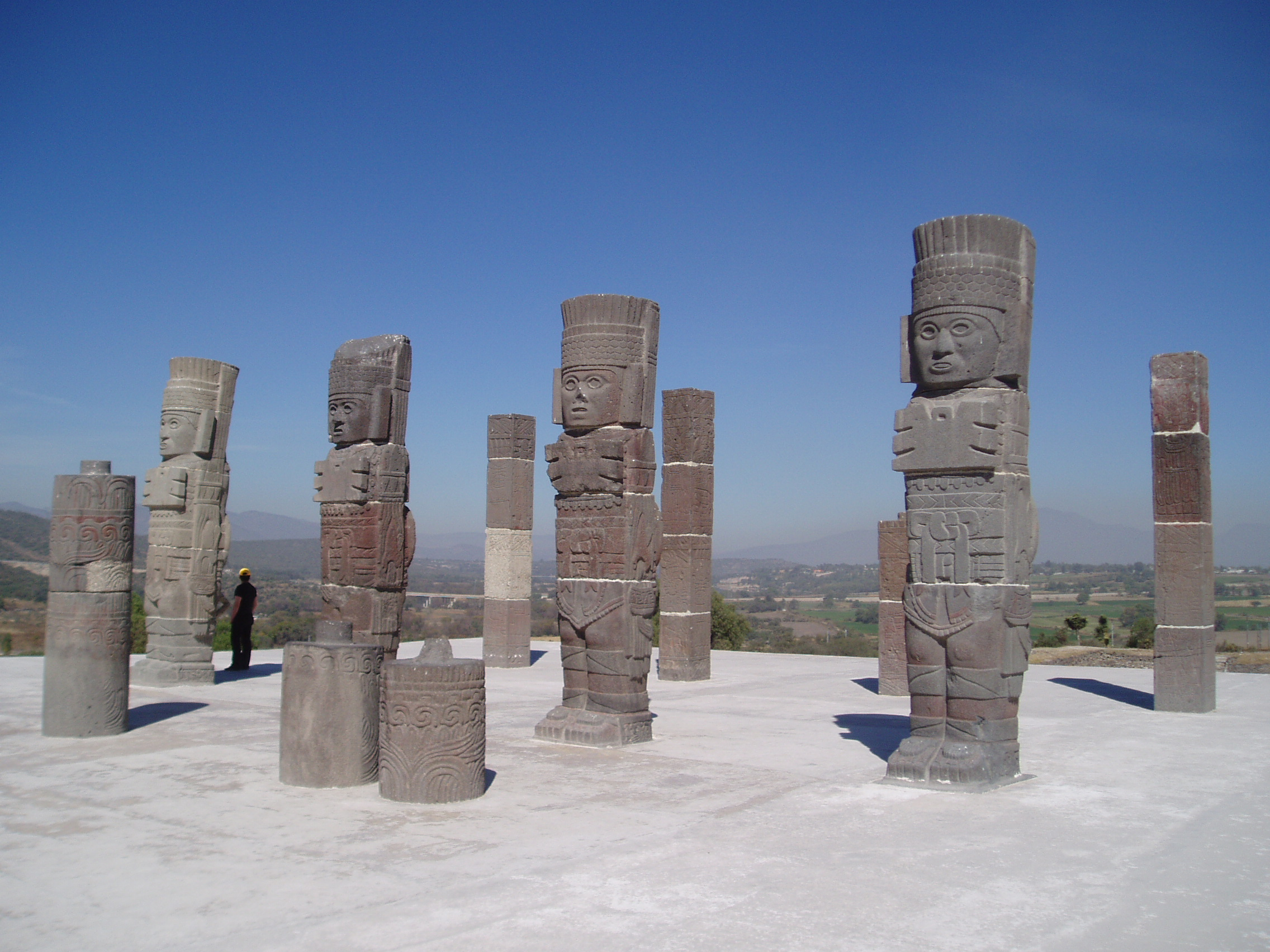 Vista de los Atlantes, las Pilastras y las Columnas Serpentinas en la cúspide de la Pirámide B. Nāhuatl: Teopantli ipan Tōllān Xīcohcotitlān.